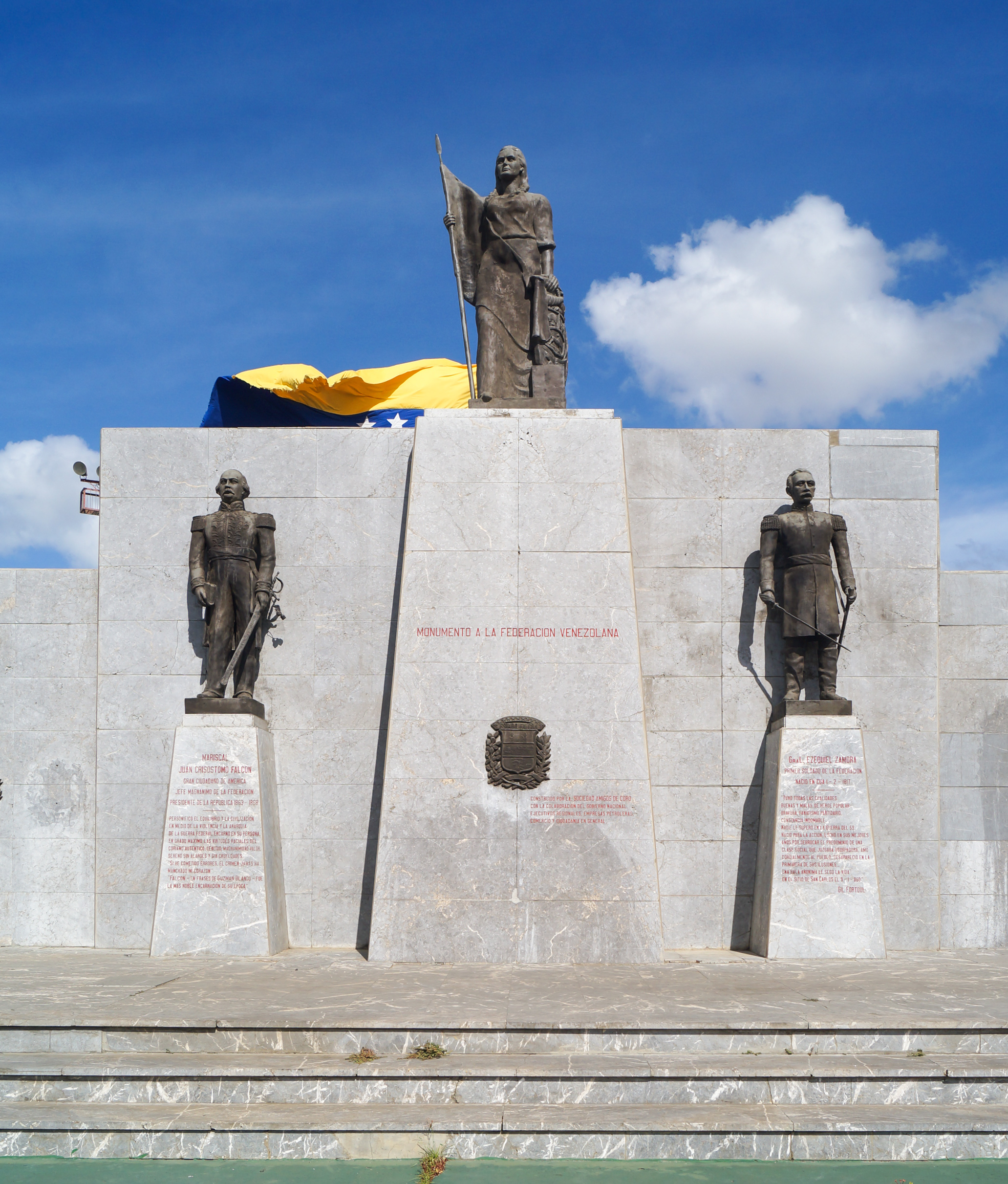 Se encuentra ubicado en la Redoma Avenida Los Medanos y Pinto Salinas. Conjunto formado por una estructura o base de concreto cubierta con losas marmolizadas, al cual se accede a través de tres escalones. En la parte central del monumento destaca la escultura que representa a la heroína falconiana Josefa Camejo y a ambos lados las esculturas del mariscal Juan Crisóstomo Falcón y el general Ezequiel Zamora. La imagen central del monumento está representada de pie, sosteniendo la bandera en su brazo derecho y apoyando su mano izquierda sobre un escudo. Las escultura del general Ezequiel Zamora, también representado de pie, viste traje con charreteras y fajín en relieve, en su mano derecha sostiene la espada y con la izquierda la vaina. El mariscal Falcón está representado con traje militar, sostiene en su mano derecha un libro y en la izquierda una espada. Estas dos últimas imágenes están colocadas sobre pedestales de inclinación vertical en los cuales se lee la identificación de los mismos. En la parte posterior del monumento, sobre una base de concreto, está colocado un cañón, así como las astas de las banderas. Coro. Estado Falcón.